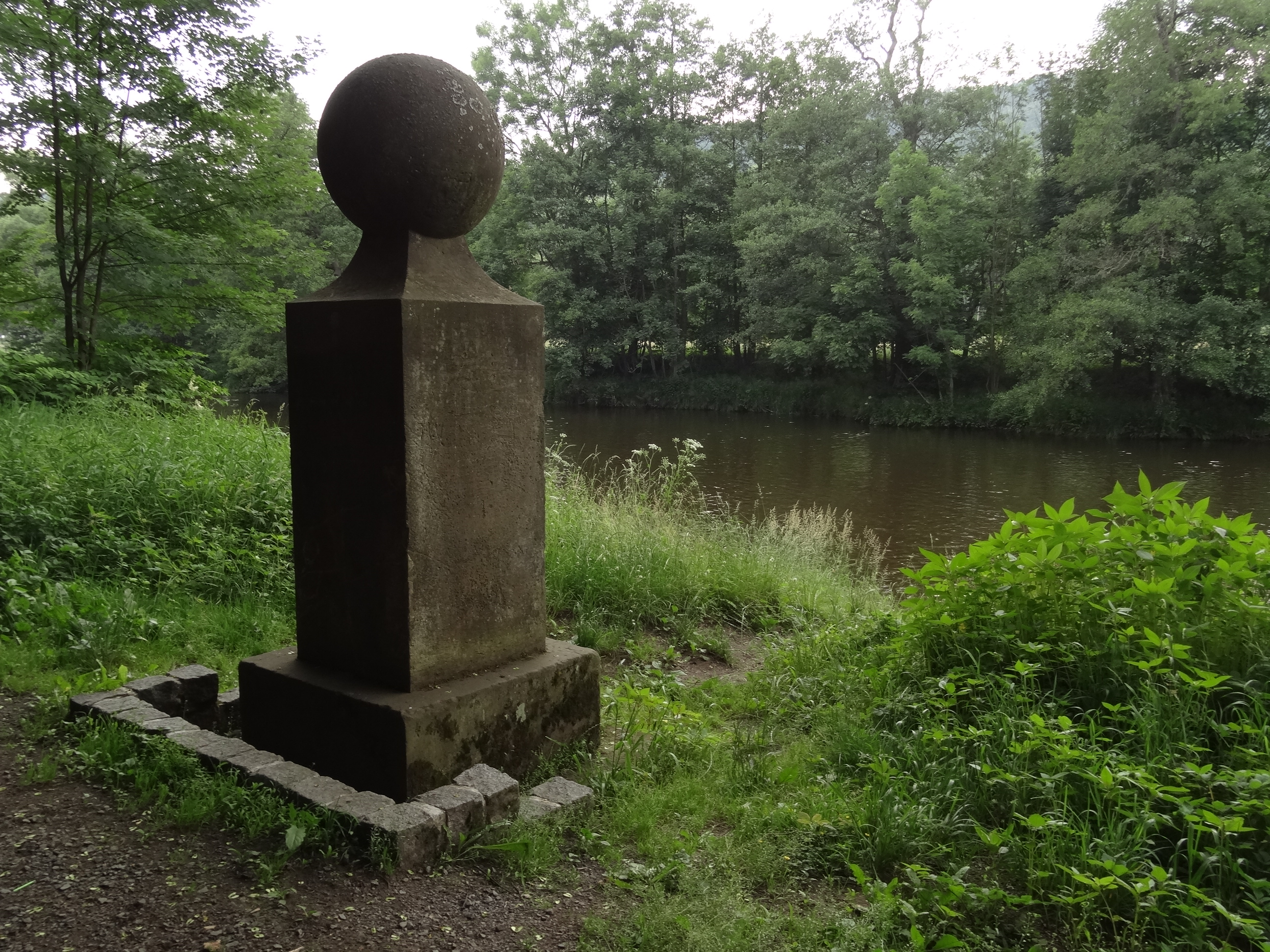 Haenkův pomník, na ostrově v Jizeře mezi Malou Skálou a Líšným, Malá Skála.